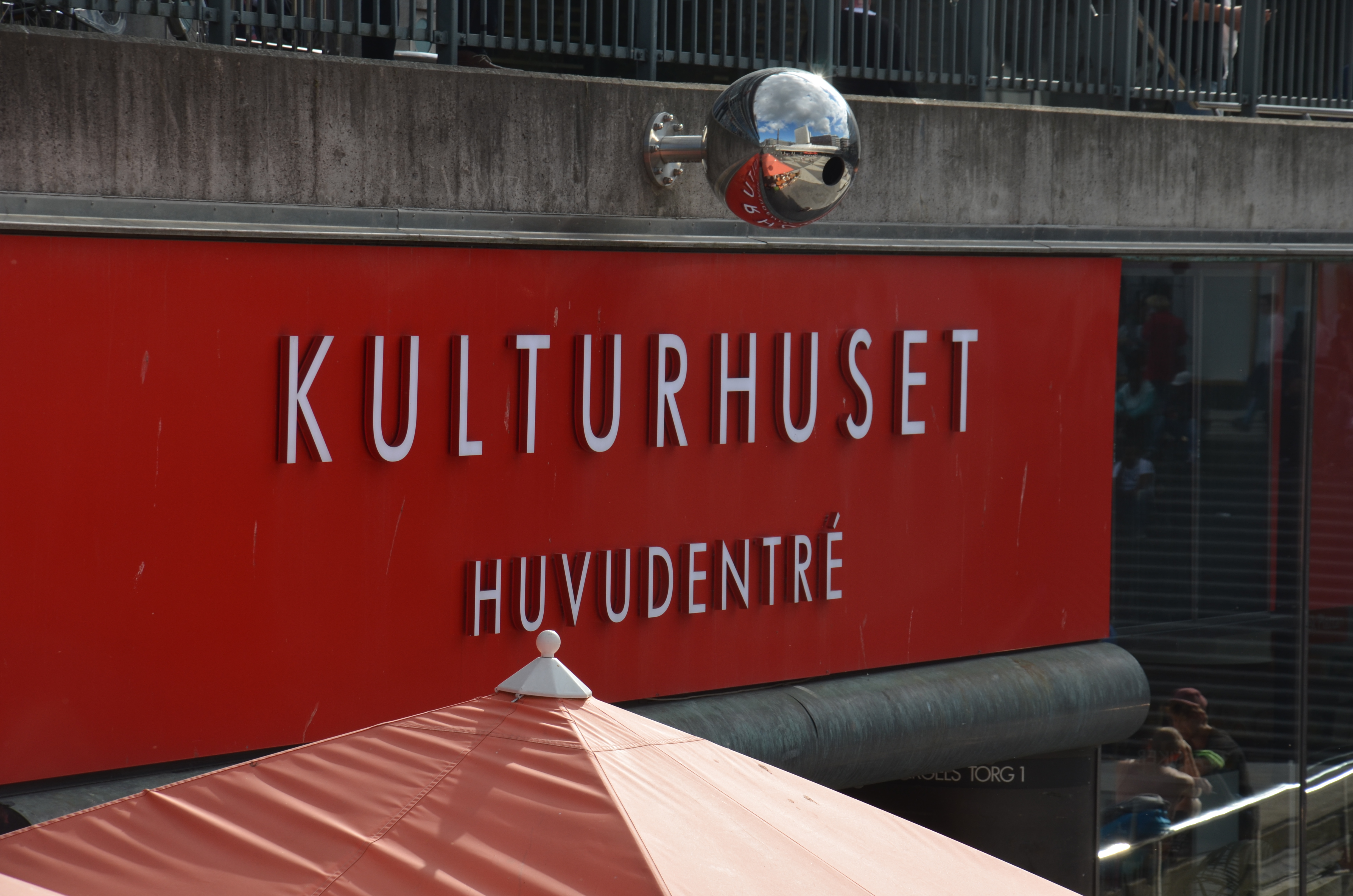 Maskaron av Christian Partos på Kulturhuset i Stockholm